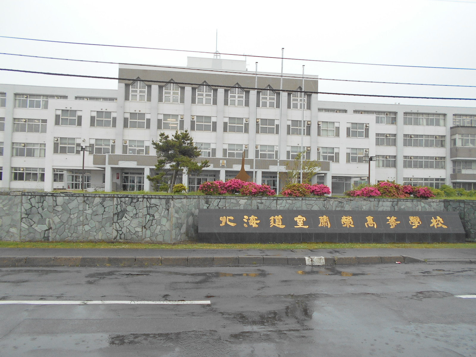 北海道室蘭栄高等学校